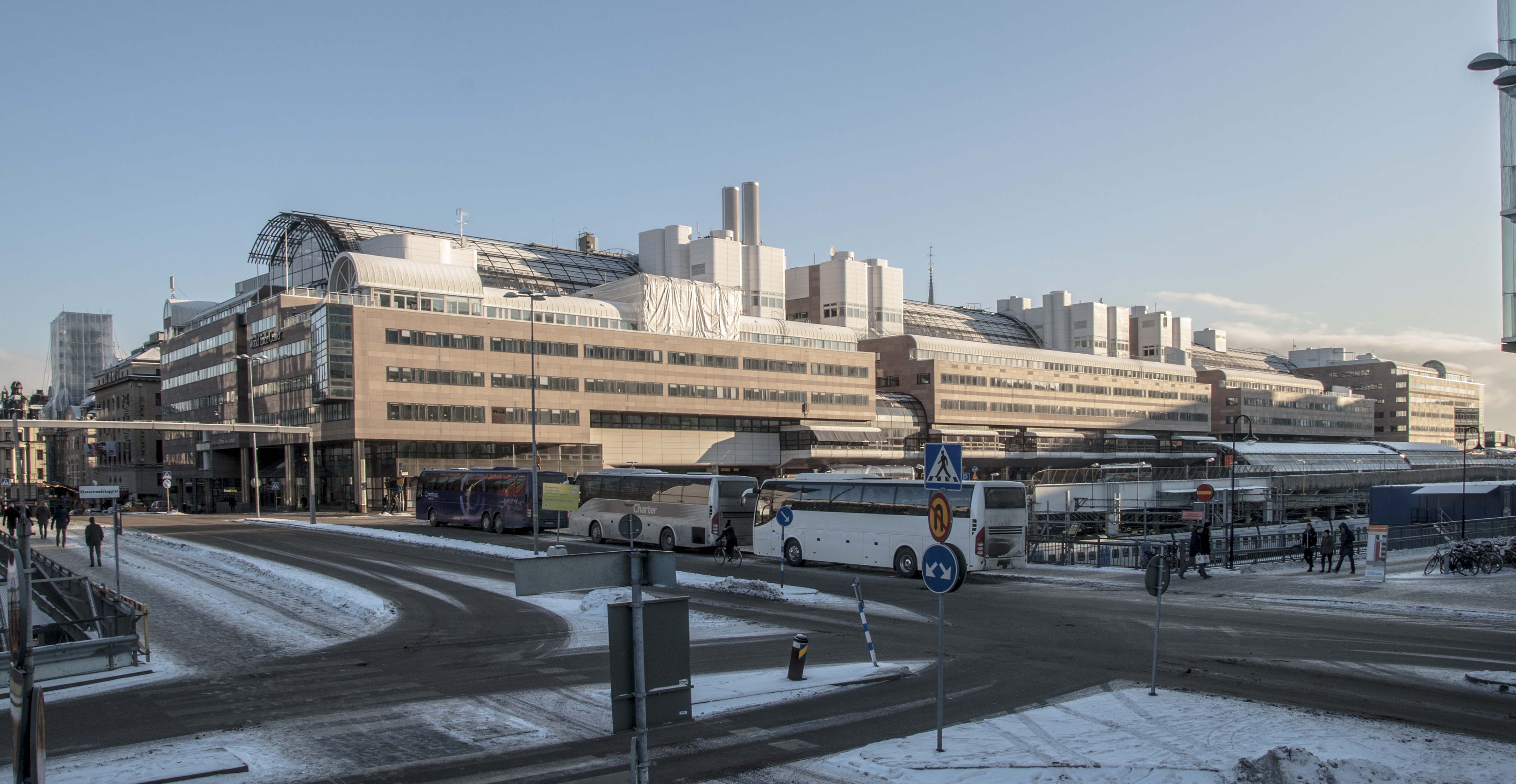 Cityterminalen 2014